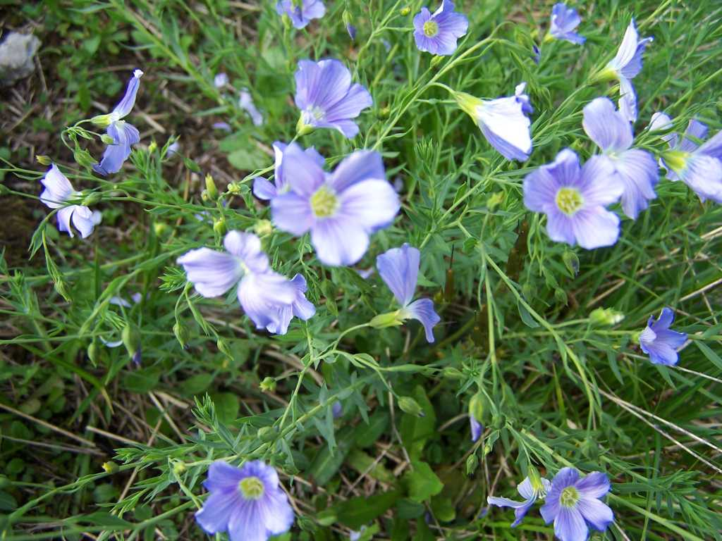 Linum extraaxillare (pl. len karpacki), habitat: Tatra Mountains, Hala Upłaz